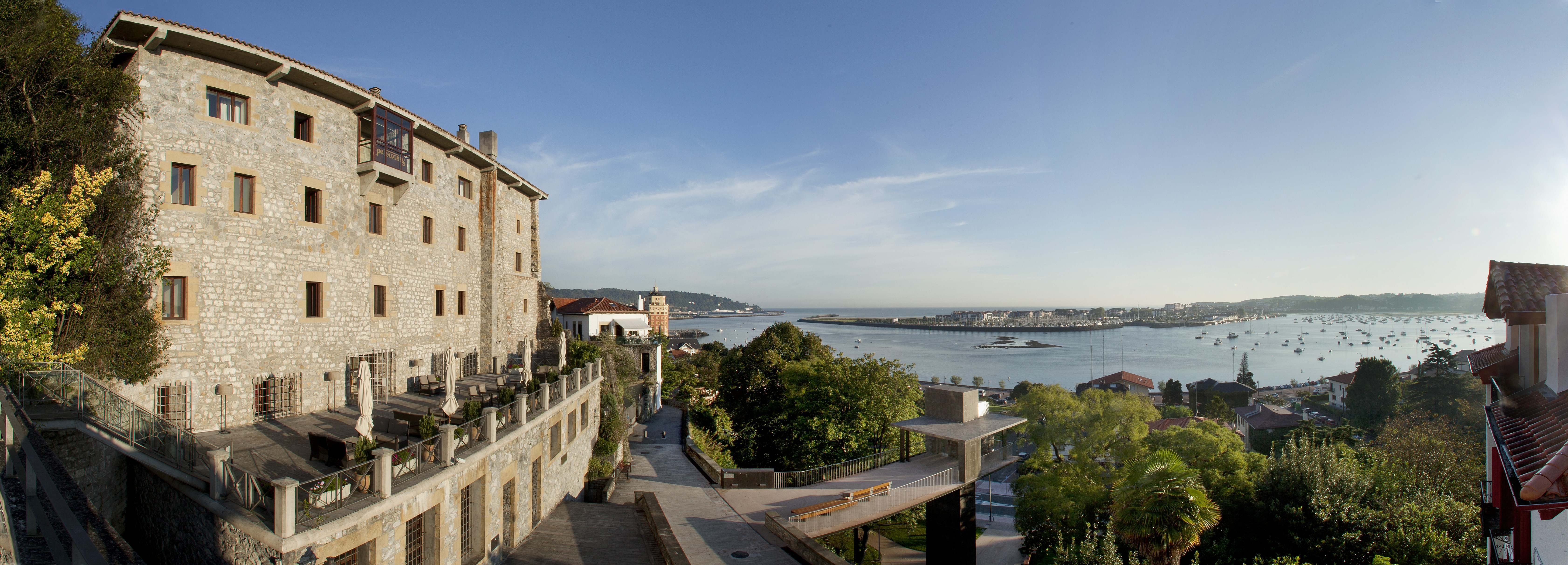 Parador de Hondarribia